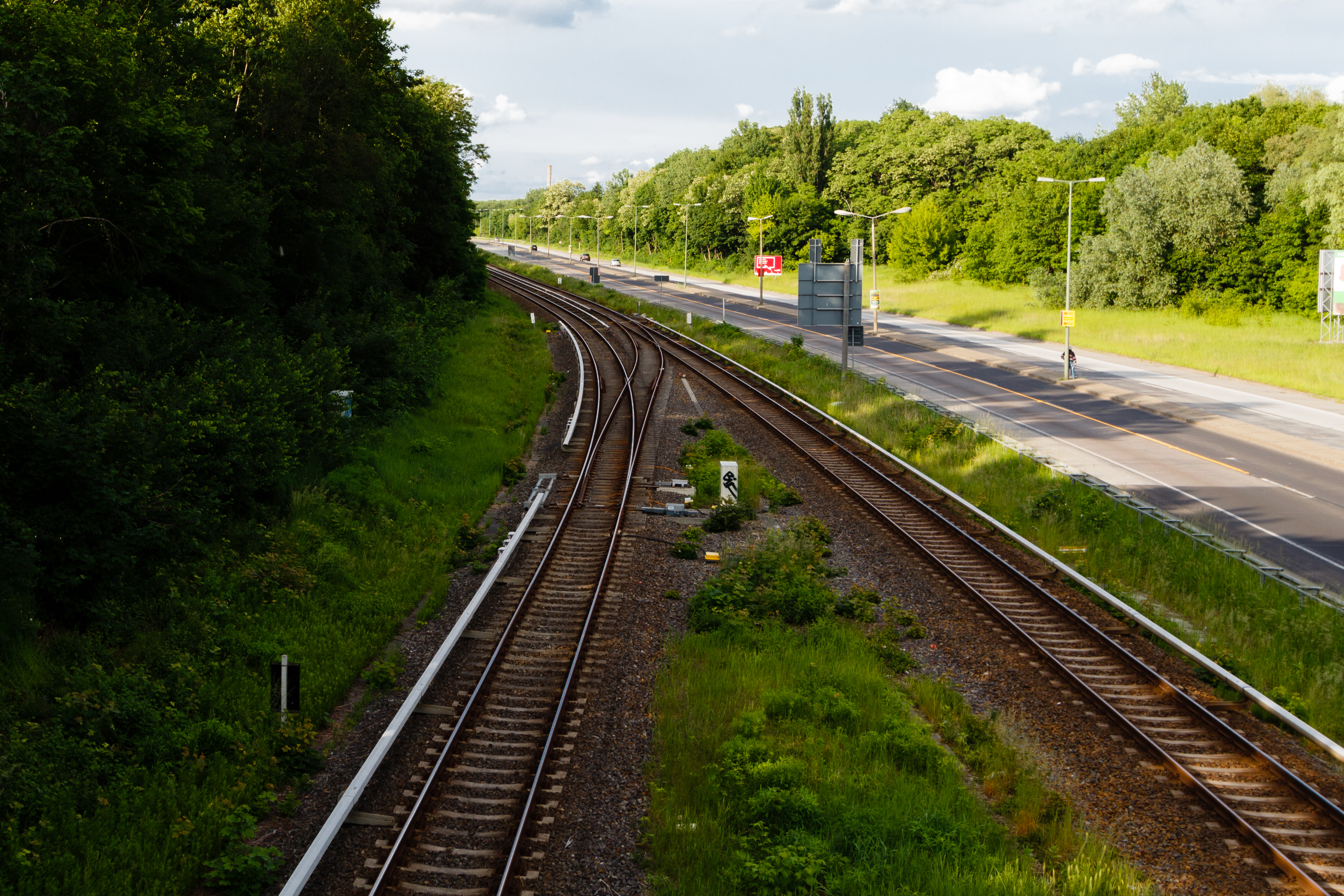 Gleisanlagen nordöstlich des S-Bahnhofs Altglienicke